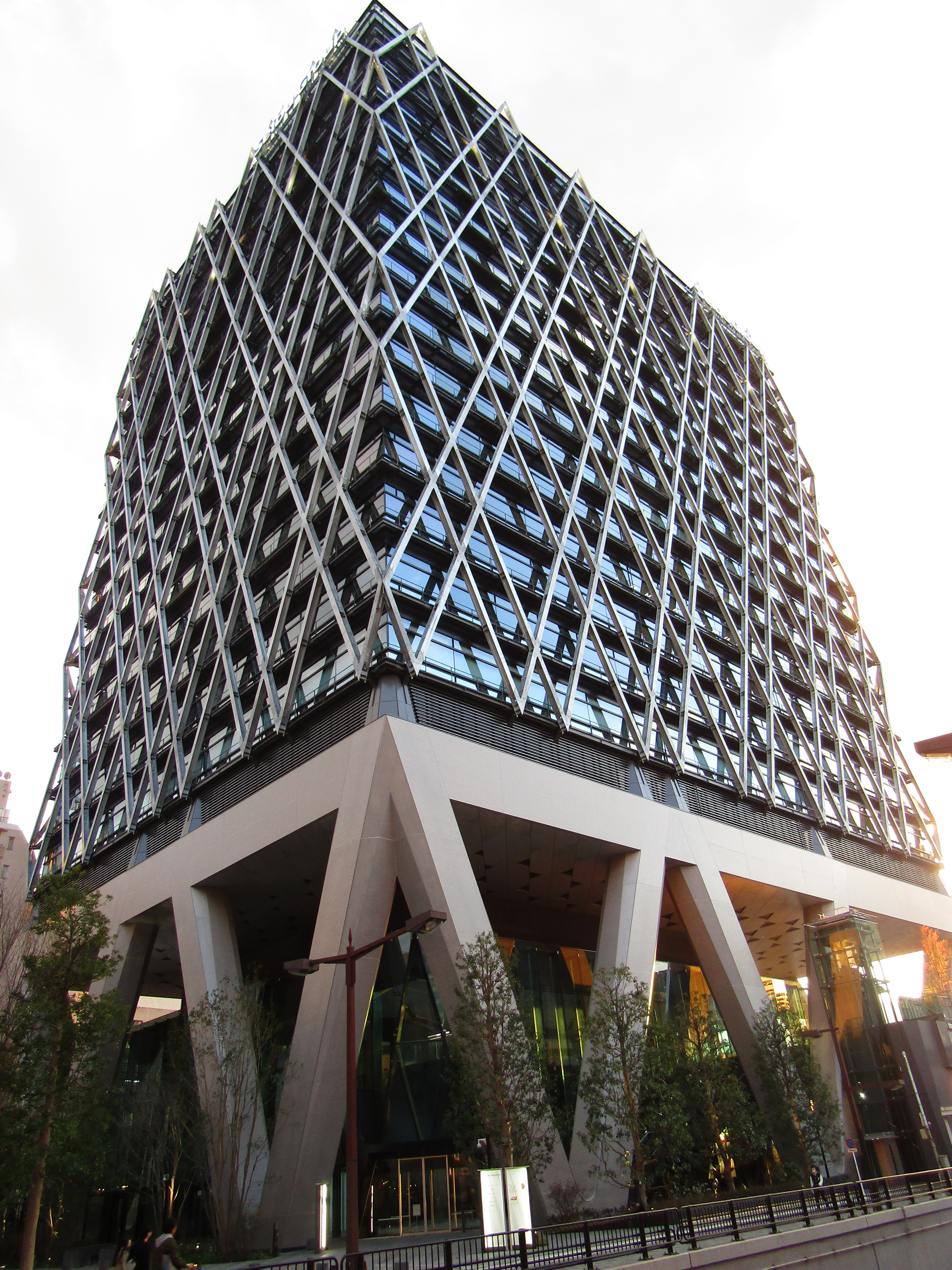 西武HD本社の「ダイヤゲート池袋」